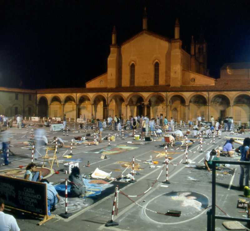 Concorso di madonnari alla fiera delle Grazie di Curtatone (MN) presso il santuario della Beata Vergine.